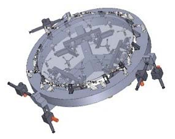 E-ELT-M3-mirror 4-m – Concave – Aspheric f/2.6 Active + Position Control